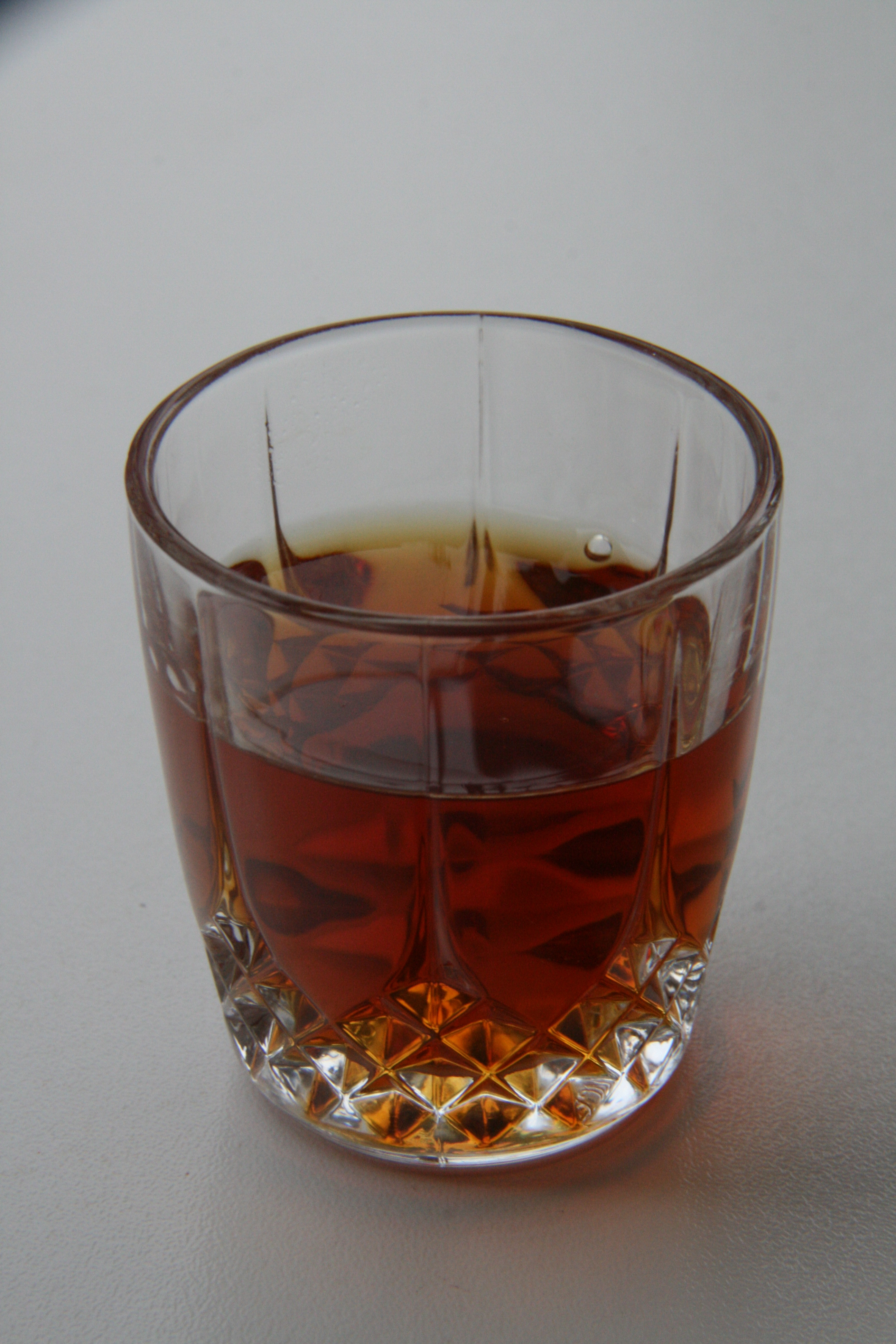 Chupito de rosoli de corazoncillo (hipericun perforatum)